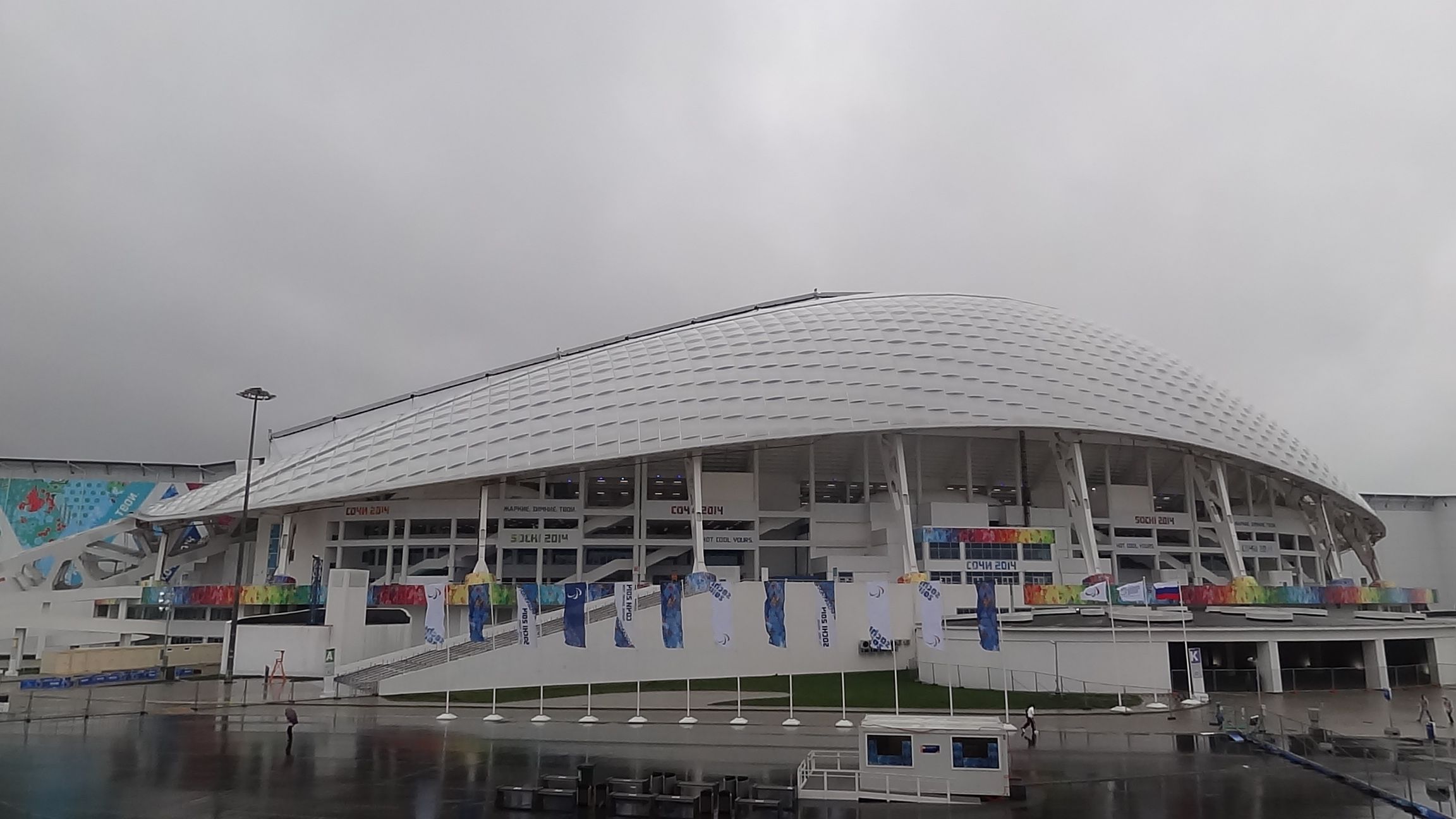 Олимпи́йский стадио́н «Фишт» г. Сочи. Построен к XXII зимним Олимпийским играм в Сочи в 2014 году. Расположен в Адлере, в Олимпийском парке.